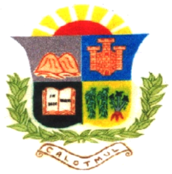 Escudo del Municipio de Calotmul.